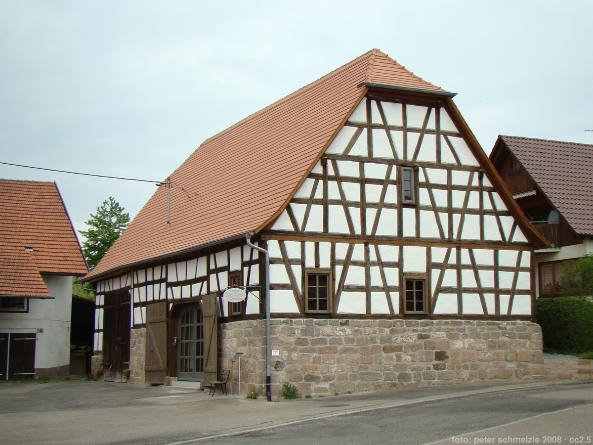 Alte Kelter in Ilsfeld-Helfenberg